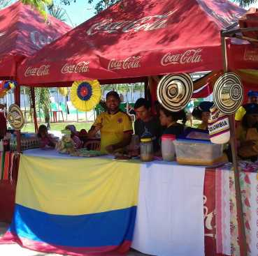 Colombianos residentes en Paraguay participando de la 1° edición del festival San Ber Internacional.